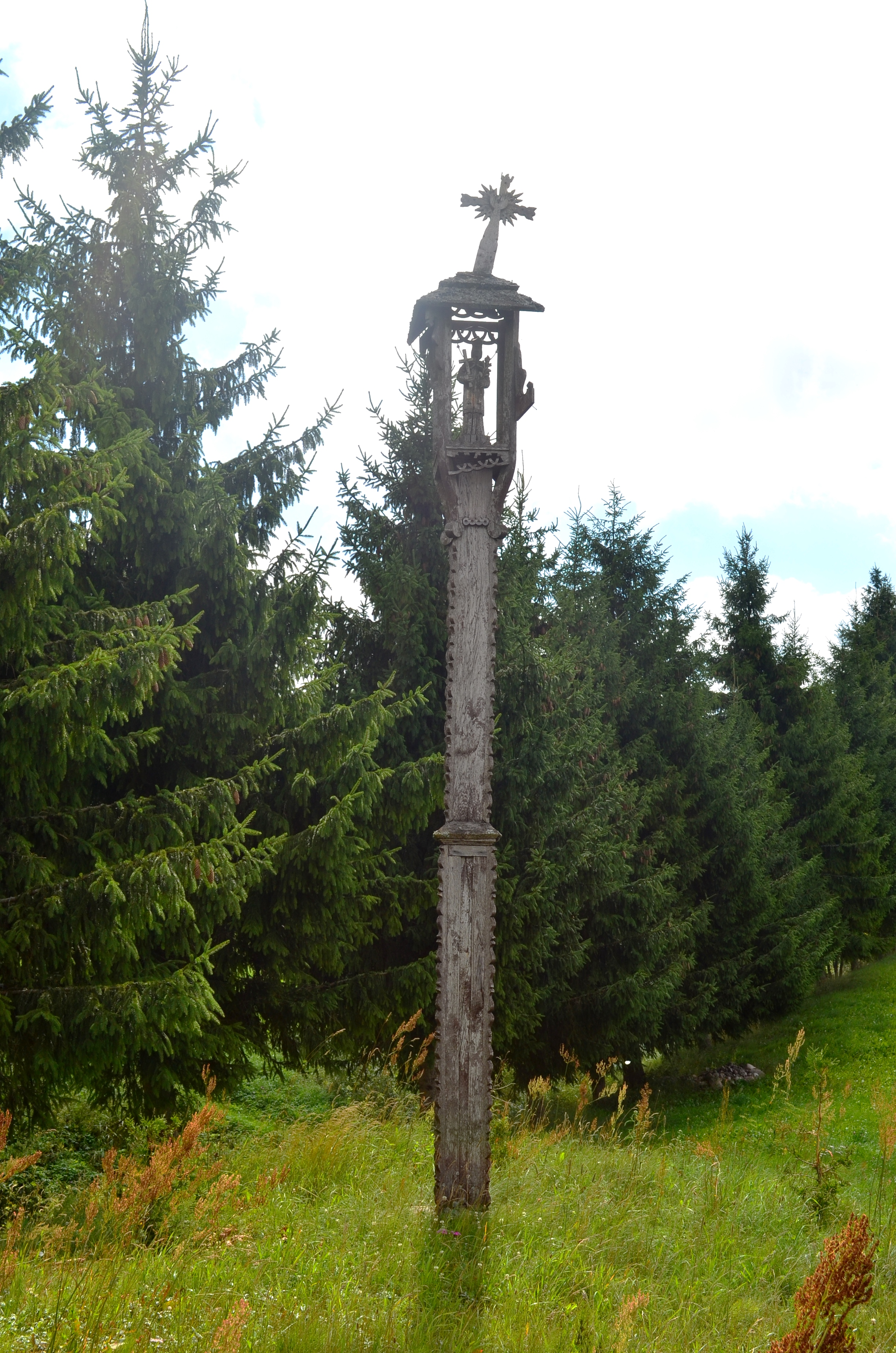 Koplytstulpis Vilkablauzdėje, Utenos raj.